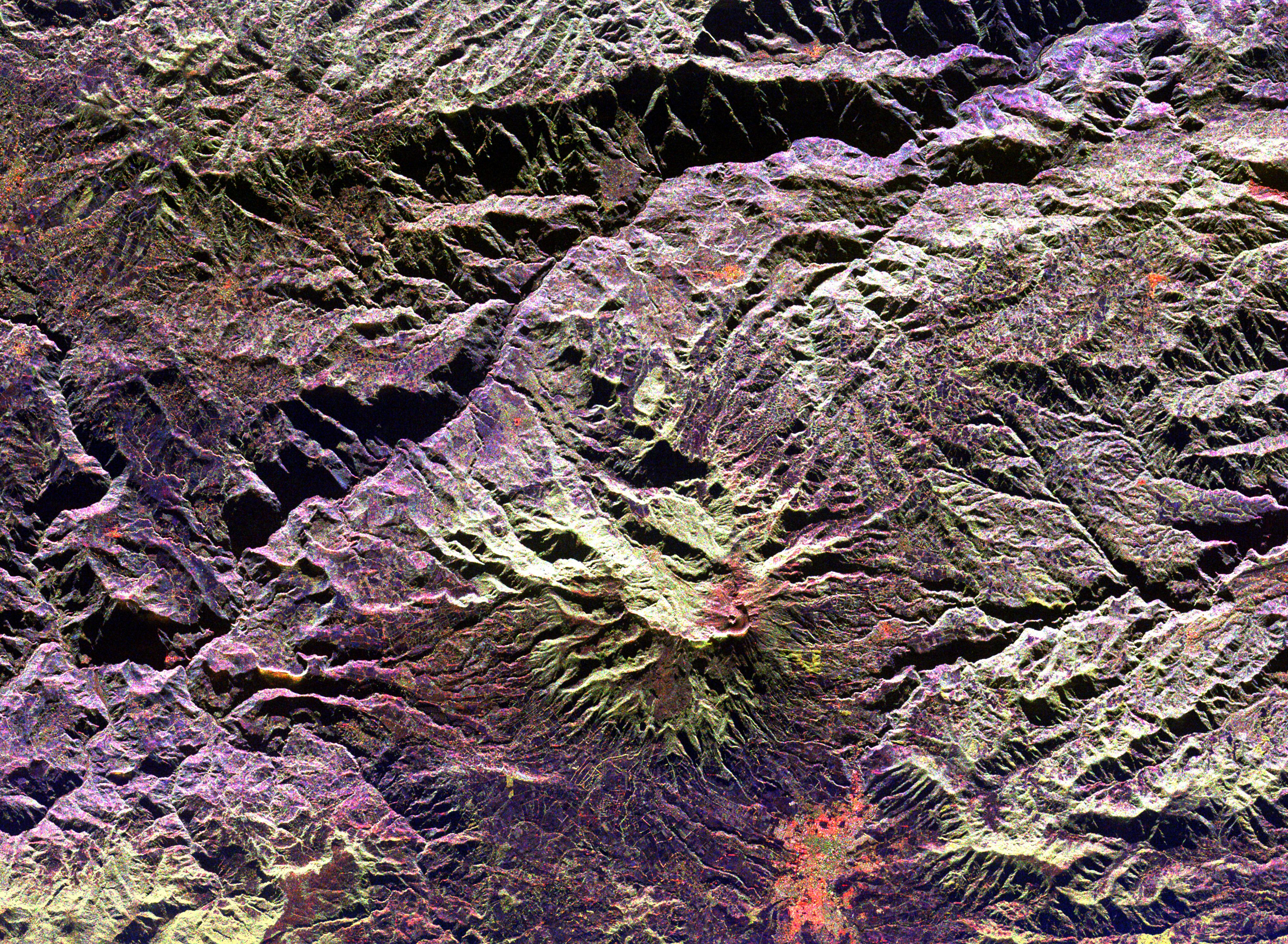 Space radar image of Galeras Volcano, Colombia. image description